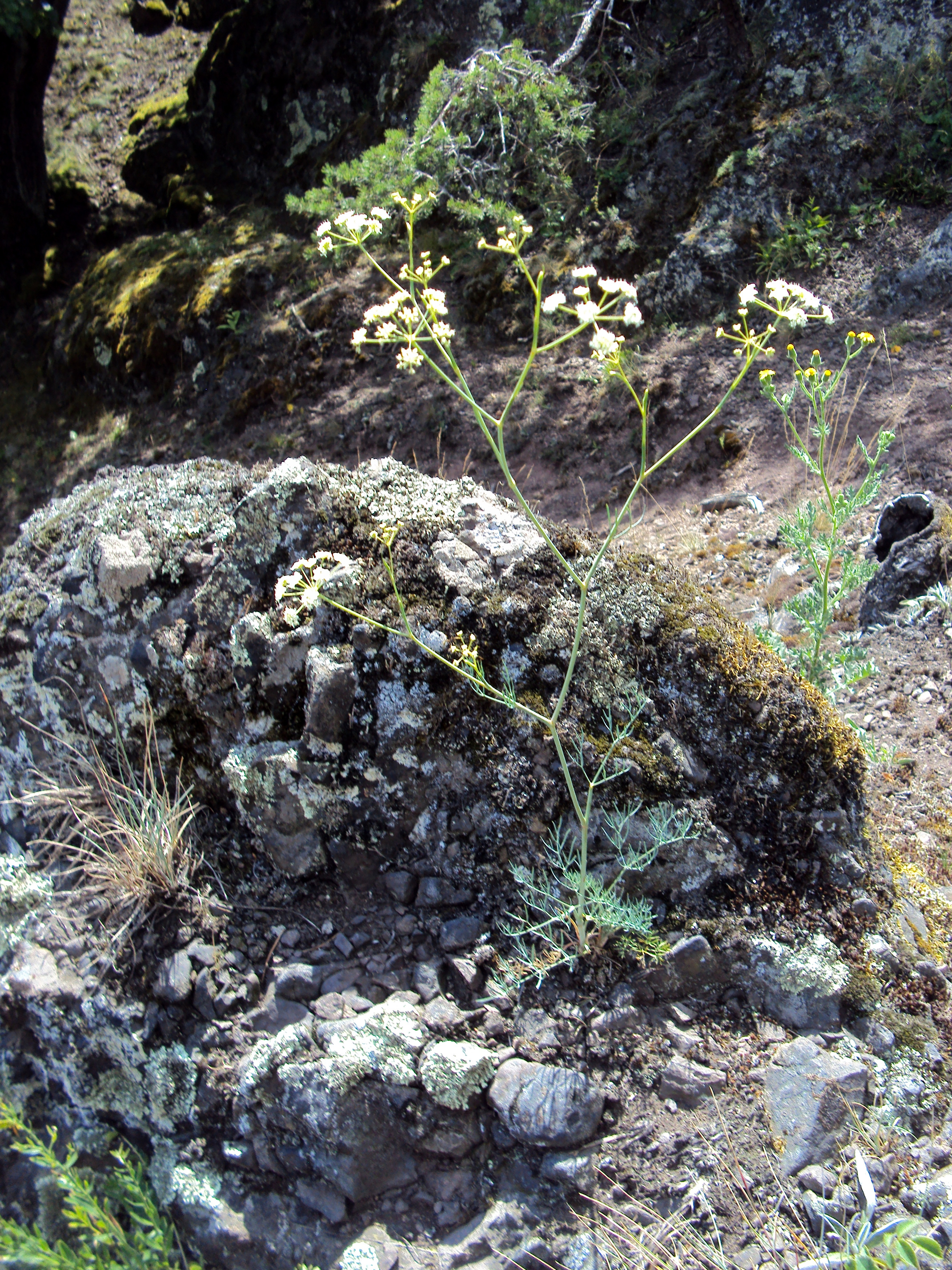 Dvouletá rostlina sesel sivý (2. rok) z přírodní rezervace Břenčák v Podkomorských lesích. Česká republika, jižní Morava